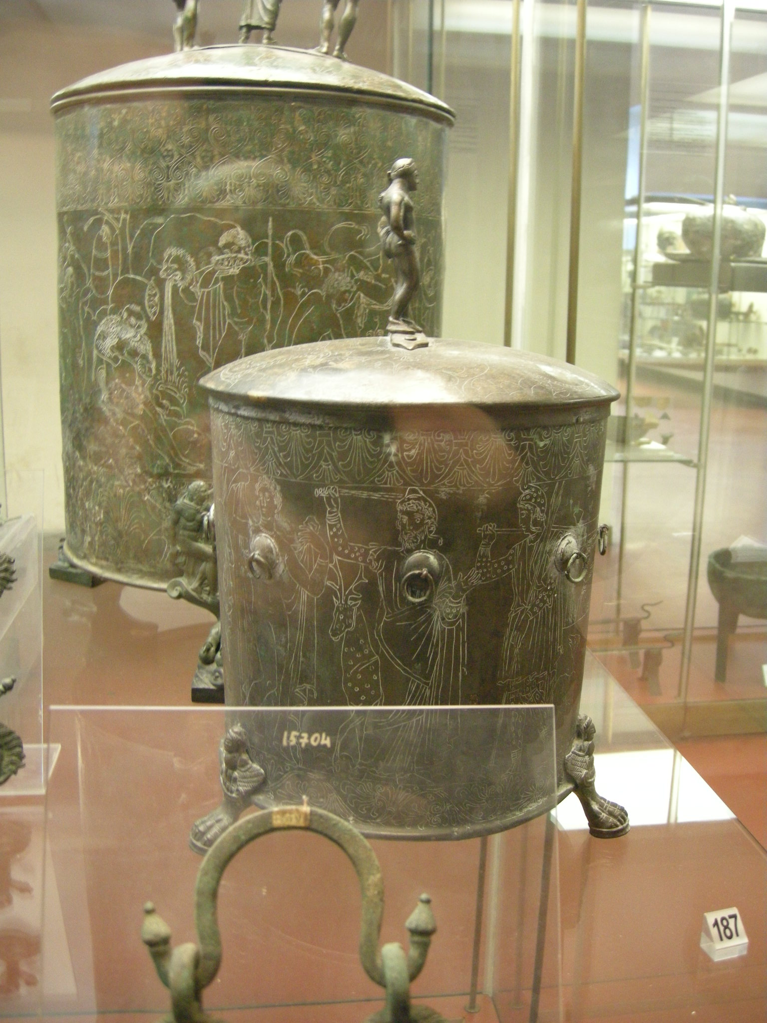 Cista ficoroni